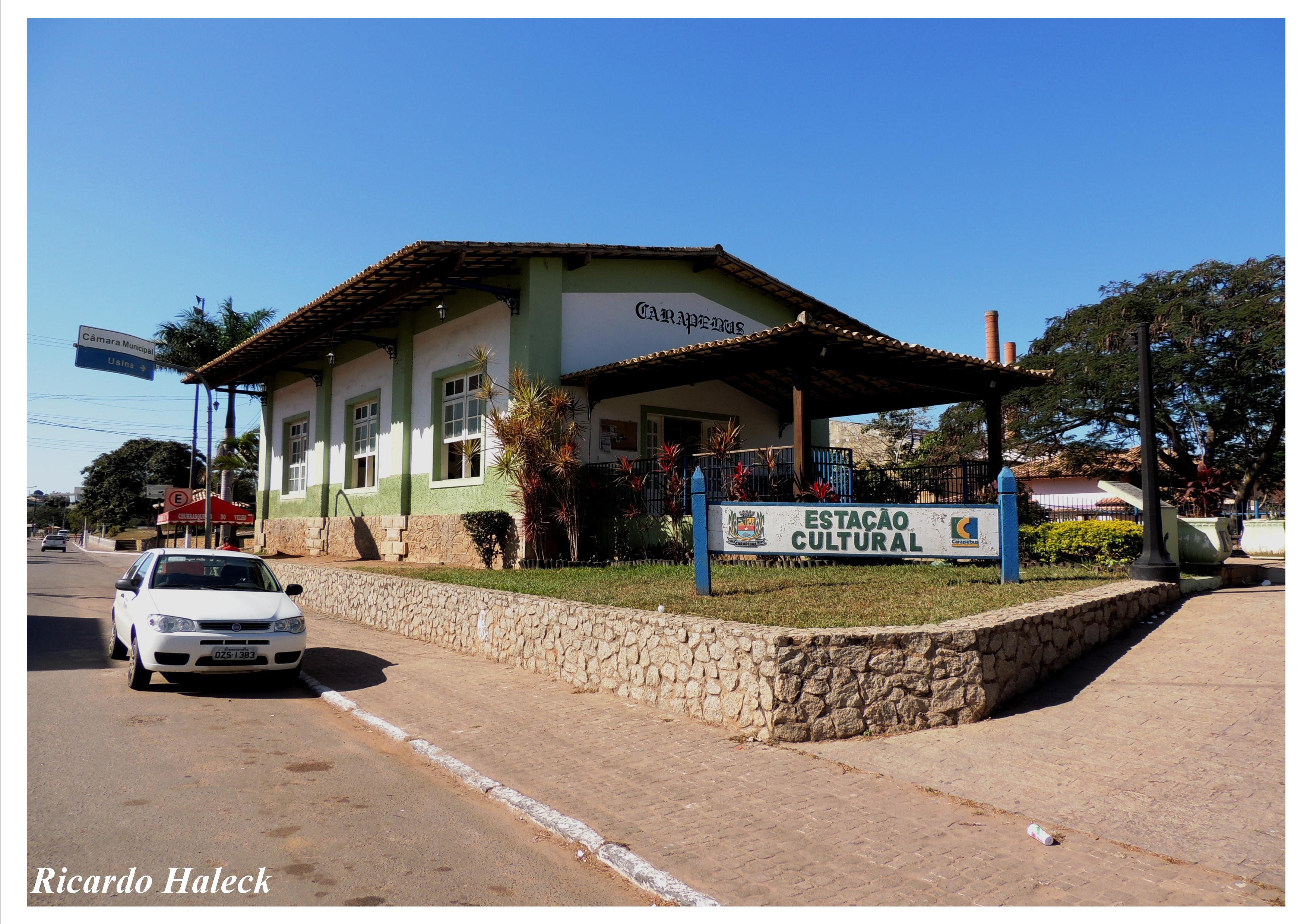 Foto na cidade de Carapebus, Rio de Janeiro - Brasil.